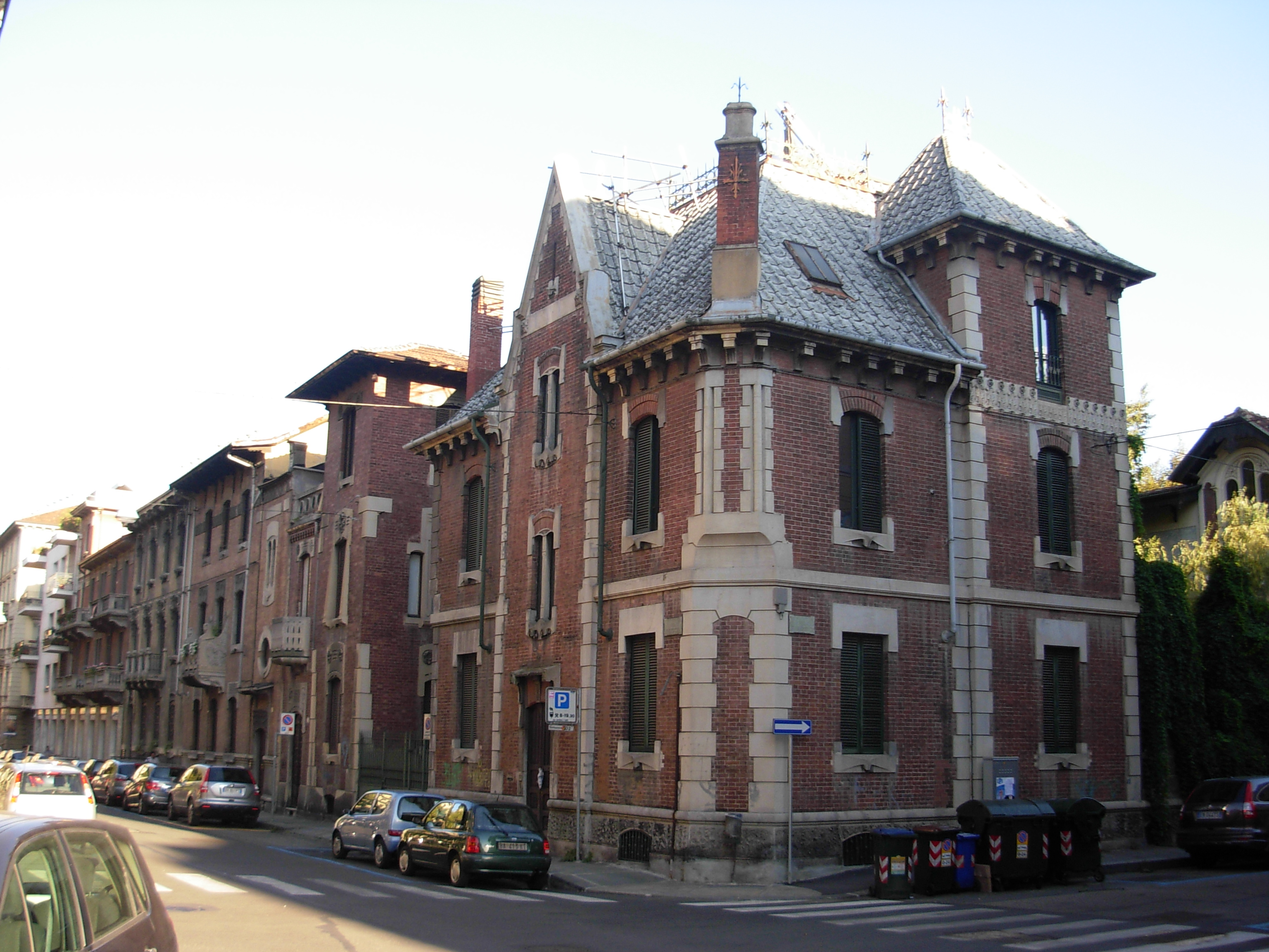 Edificio liberty in Torino, via Pietro Piffetti angolo via Claudio Beaumont (vedi)